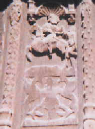 Bas-relief sur bois, surmontant la porte de l'église paroissiale de Ligugé, représentant saint Martin de Tours partageant son manteau avec un pauvre.